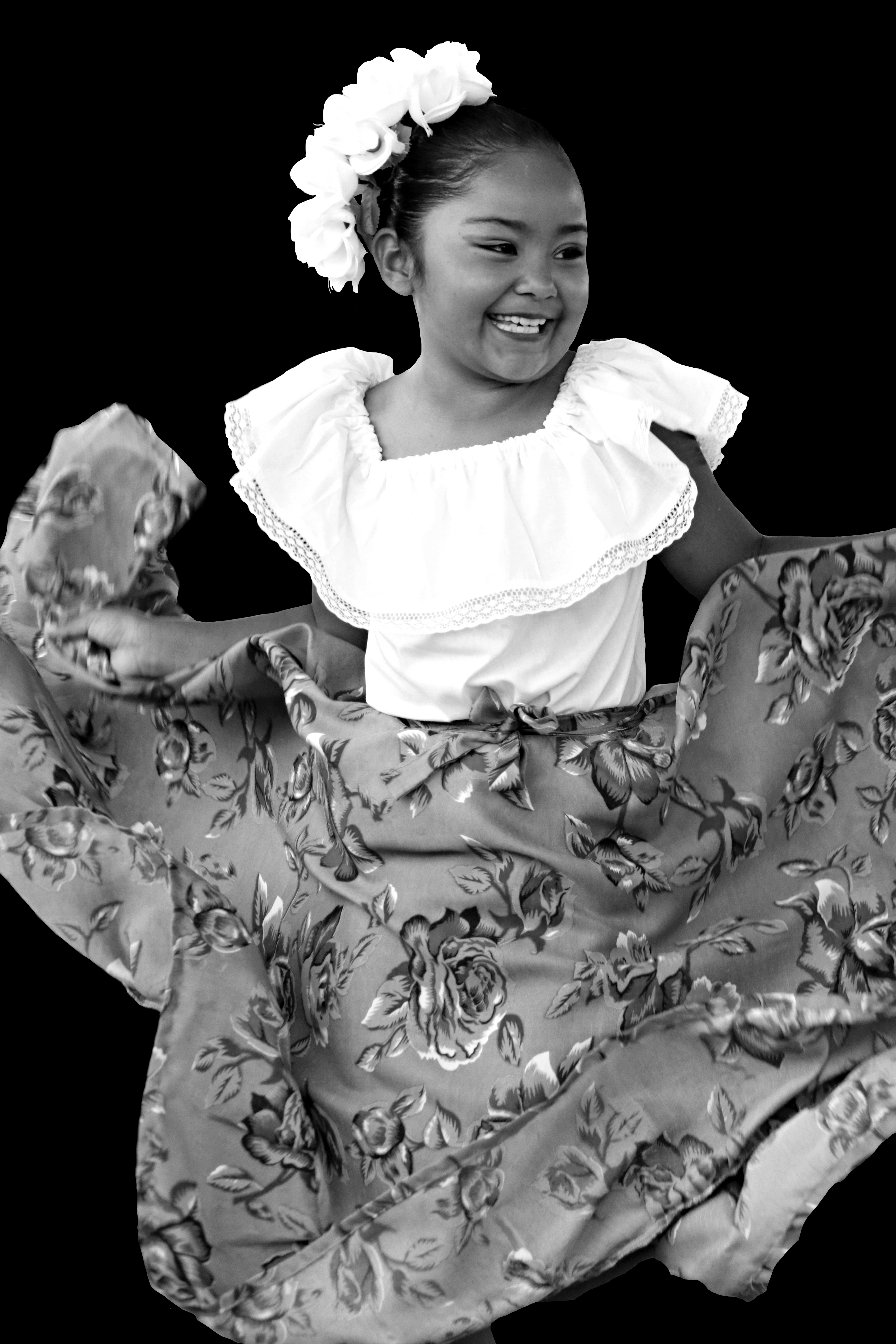 La danza es una de las expresiones más sublimes de la cultura mexicana. Sólo quien ha sido partícipe entiende la gran pasión que ella engloba.